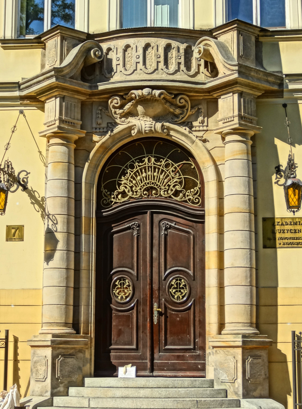 Zespół Urzędu Powiatowego, zbud. 1904-1906, ob. budynek główny Akademii Muzycznej w Bydgoszczy przy ul. Słowackiego